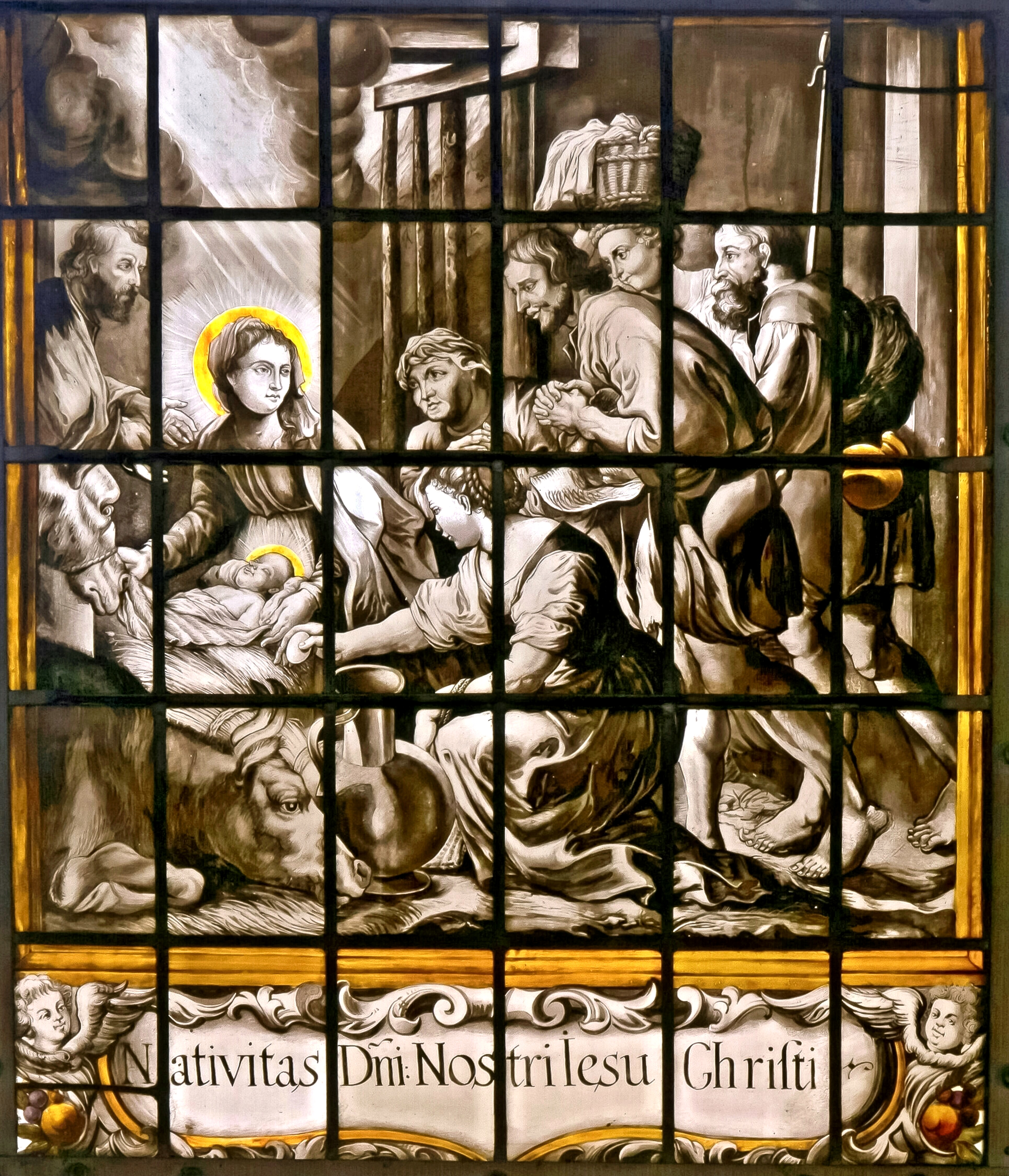 Bleiglasfenster in der Karmeliterkirche St. Josef in Beilstein: Anbetung der Hirten (nach einem Kupferstich von Peter Paul Rubens, um 1620)